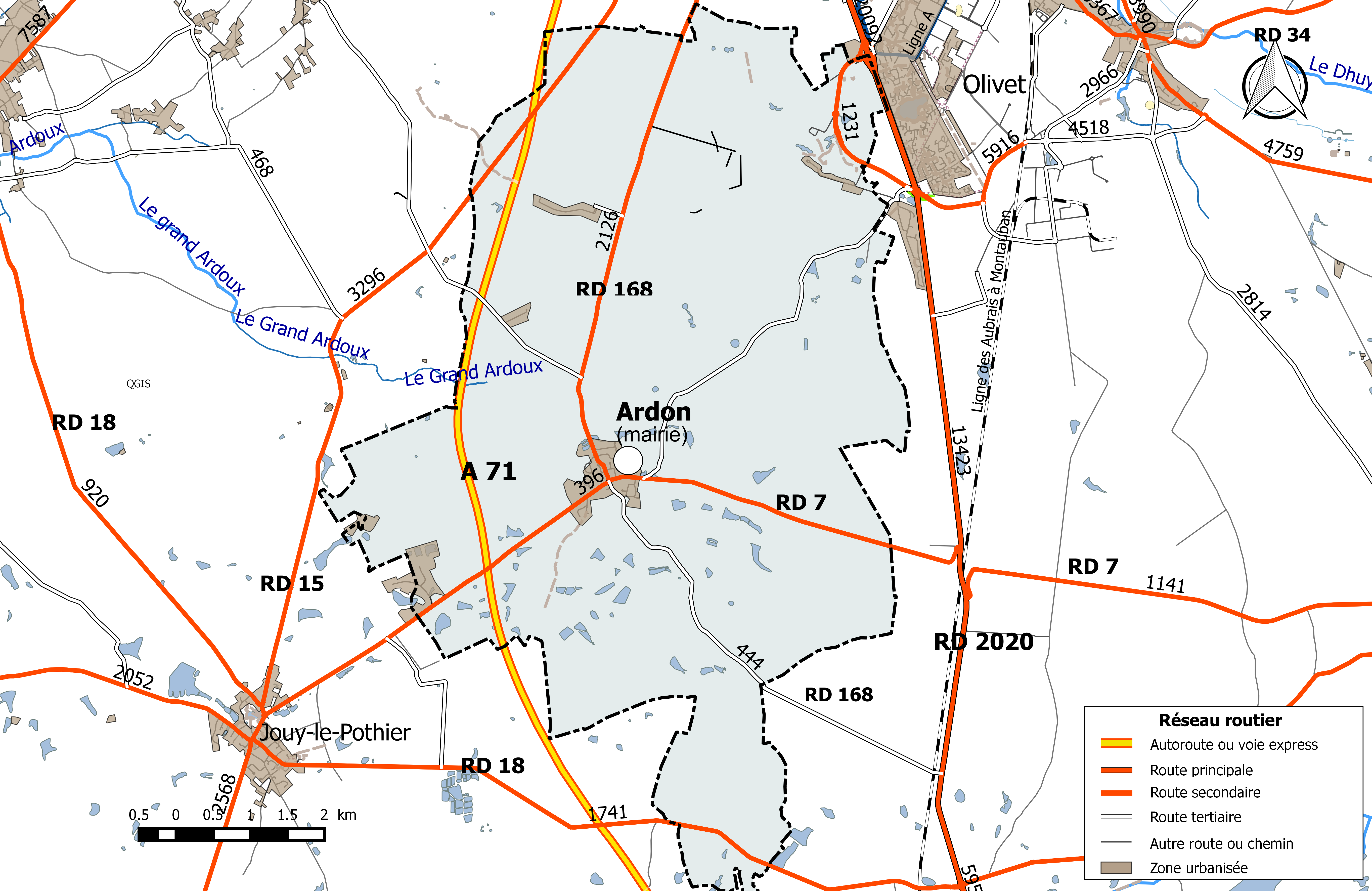 Carte du réseau routier de la commune de Ardon (Loiret).